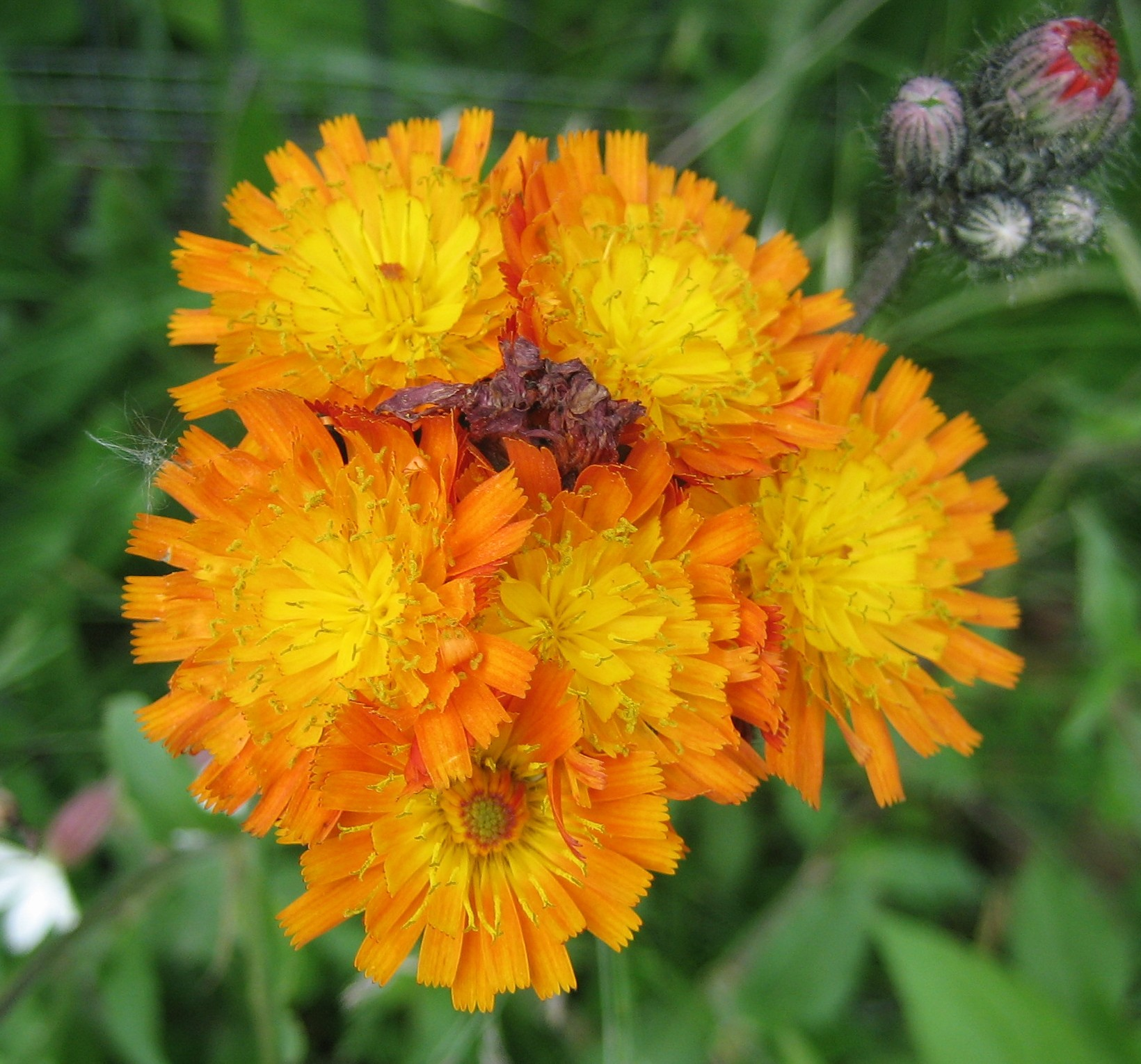 Orangerotes Habichtskrautblütte, im Spätfrühling Autor(en): Rita Erfurt Bildbeschreibung: Orangerotes Habichtskrautblütte im Spätfrühling Mögliche Artikelverwendung: Hieracium aurantiacum, Habichtskräuter, Orange-rotes Habichtskraut